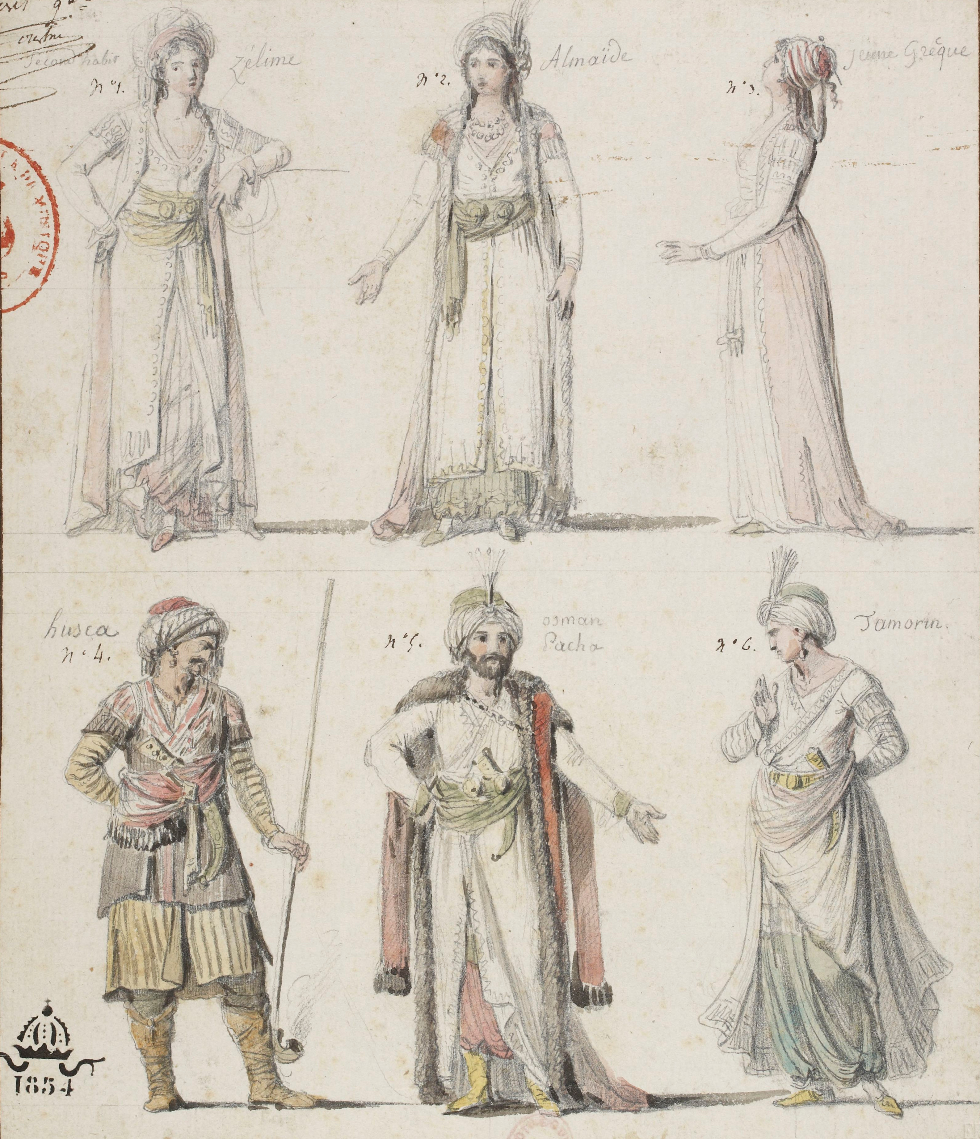 Jean-Simon Berthélémy (1743–1811): Kostümentwürfe für die Opéra-ballet "La caravane du Caire (1783) von André-Ernest-Modeste Grétry (1741–1813), 1790. Bibliothèque nationale de France. Randlos.